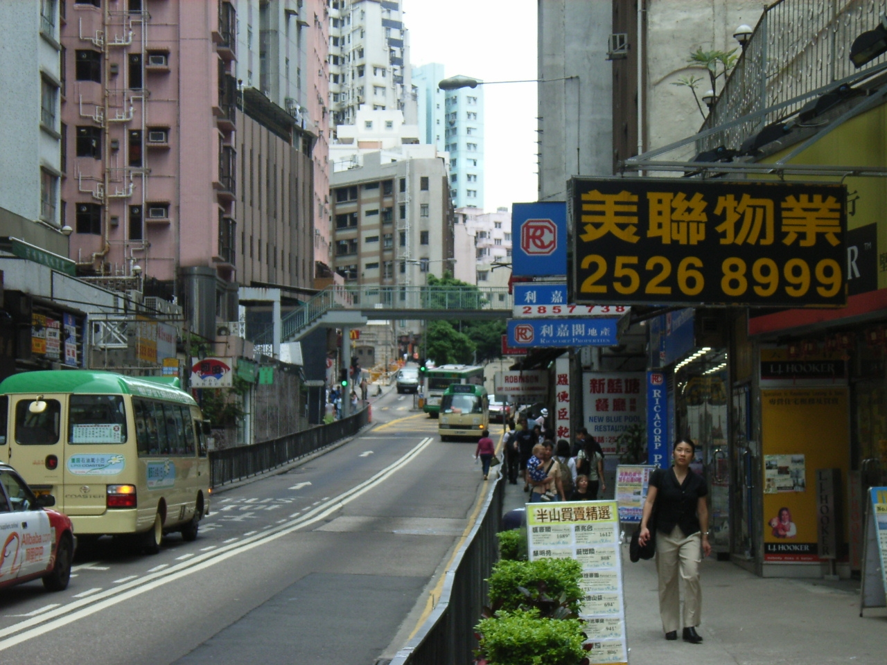 堅道是香港半山區的一條主要道路，以香港第一位裁判官威廉·堅恩（William Caine）命名。